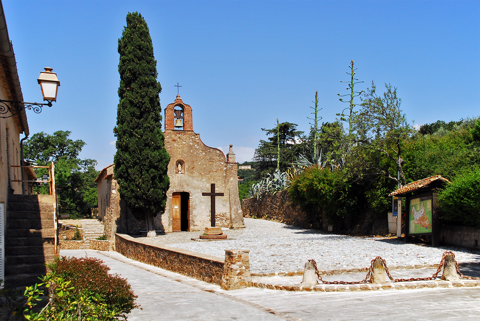 Grimaud